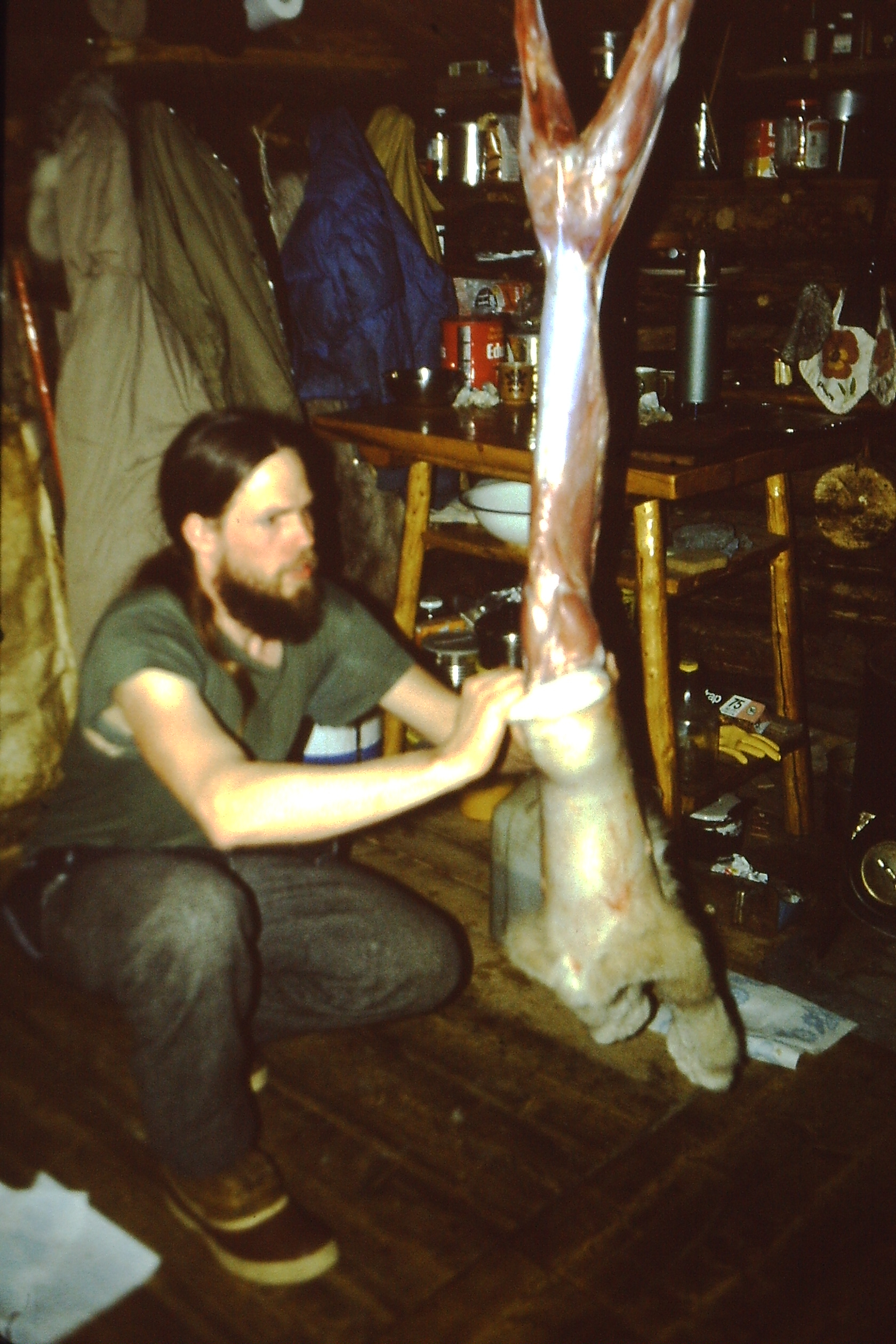 Brooks Range, Alaska. Abziehen eines Luchses durch den Trapper.